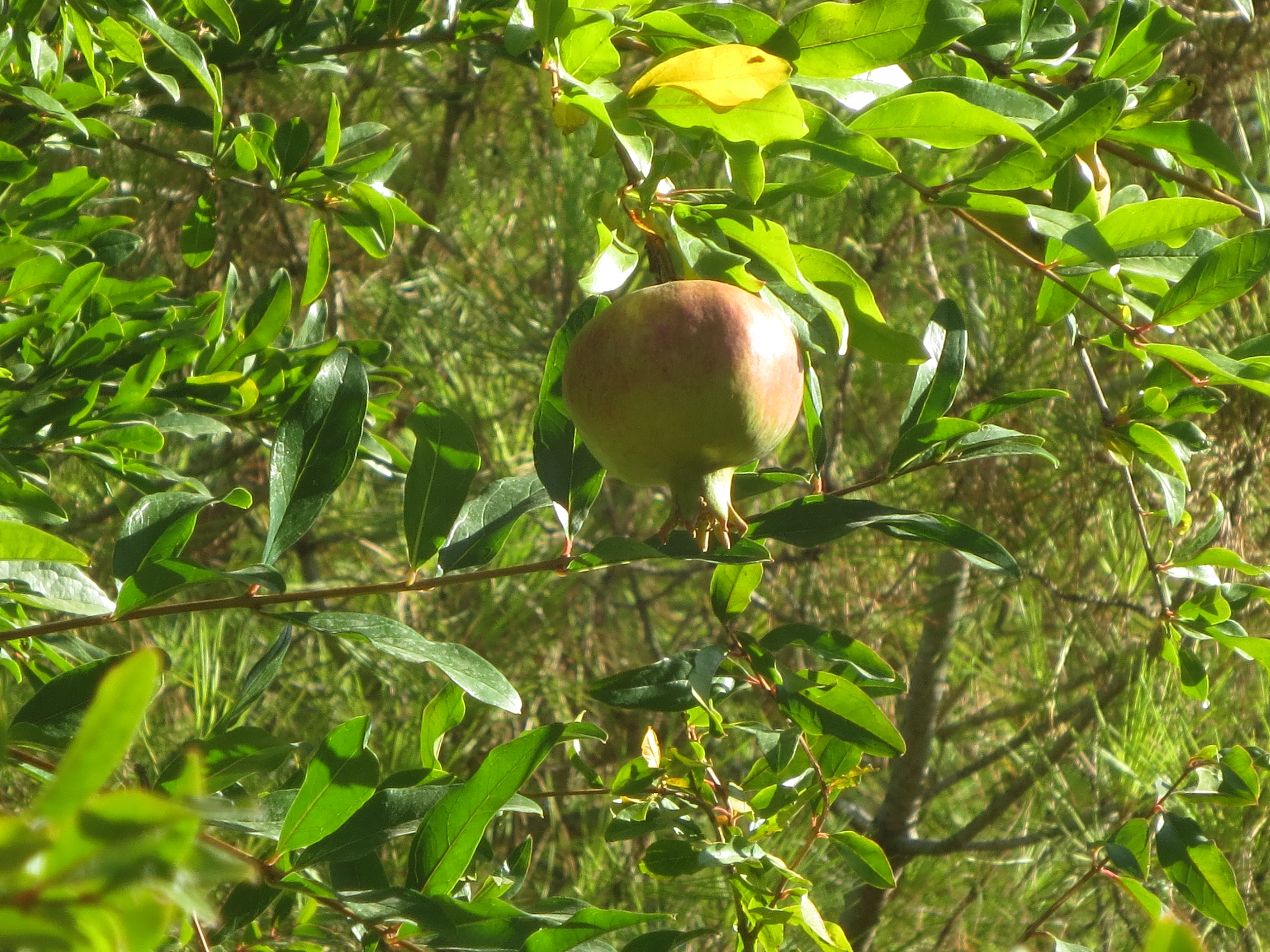 Grenade